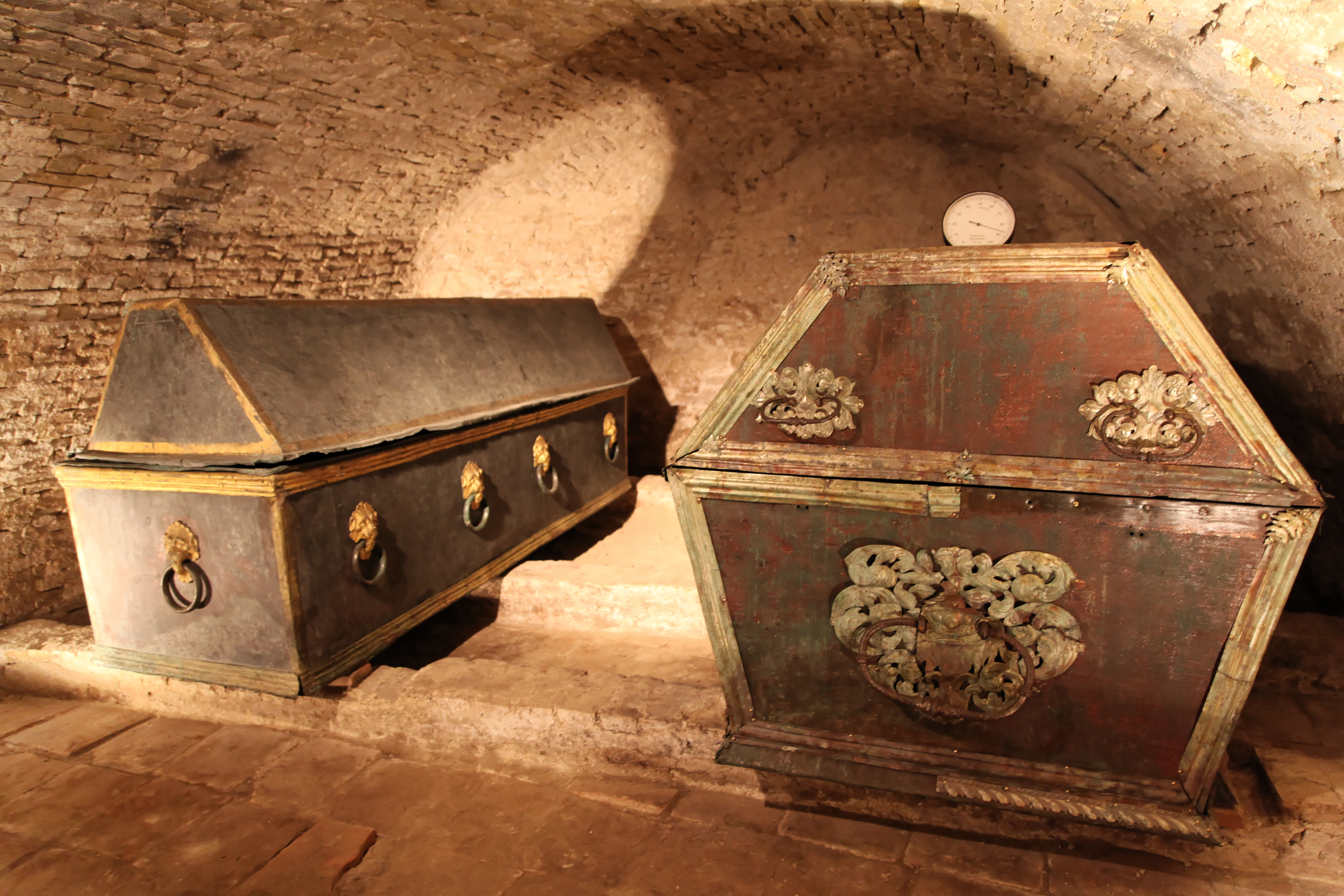 Gruft der Familie von Wedel in der Reformierten Kirche (Loga), Am Schlosspark in Leer (Ostfriesland)